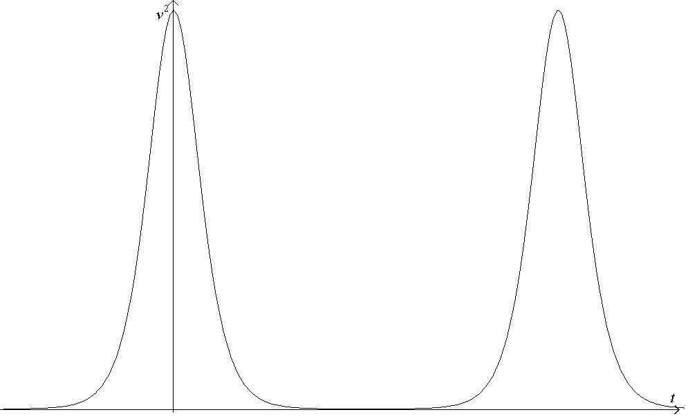 Vitesse du pendule simple au voisinage de la séparatrice Licensing Source : image créée par l'auteur (Theon)